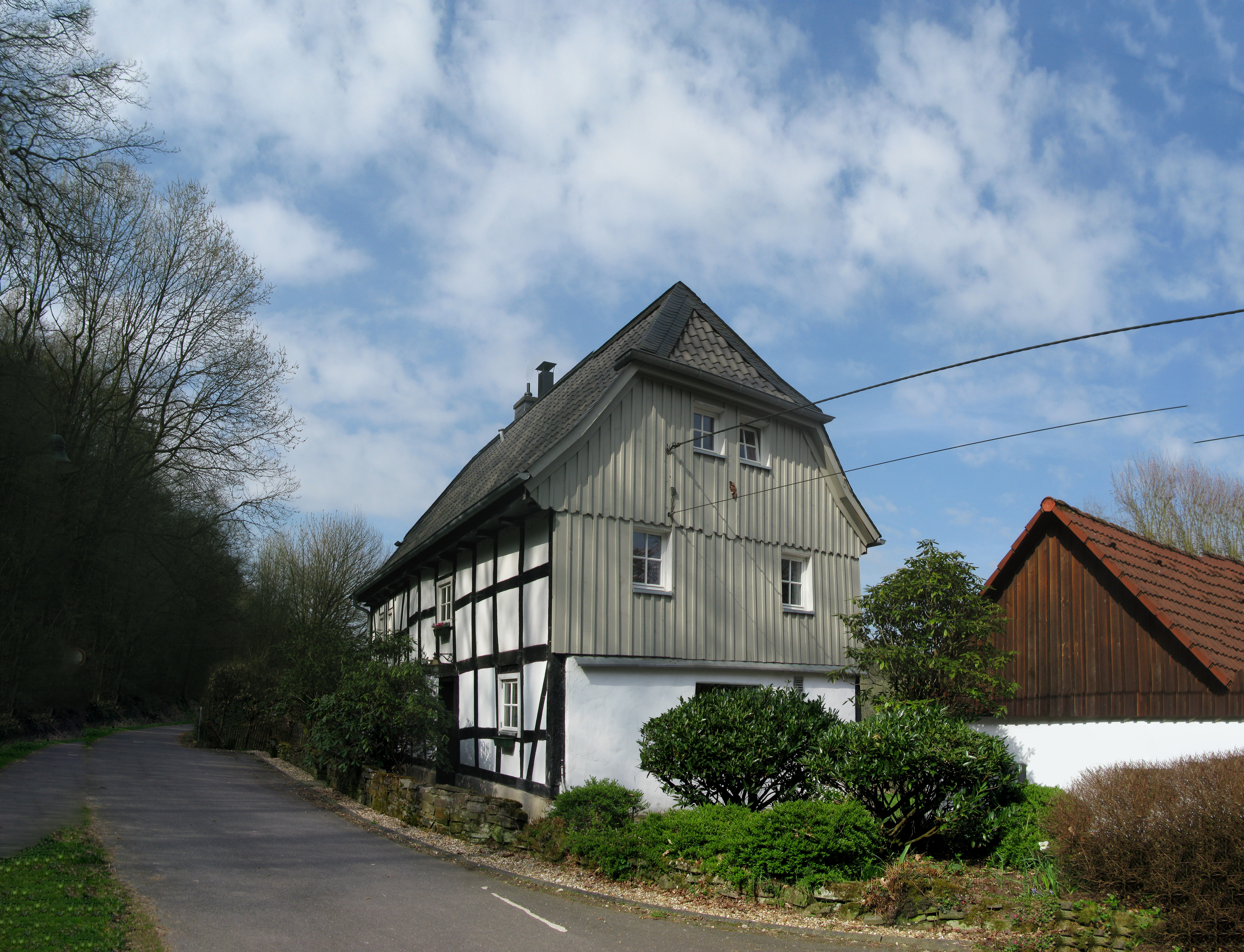 Fachwerkhaus Schachenaueler Straße 56 Denkmalliste Nr 107 am 14. April 2015